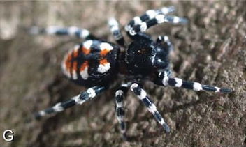 Loureedia annulipes (syn. Stegodyphus annulipes) male